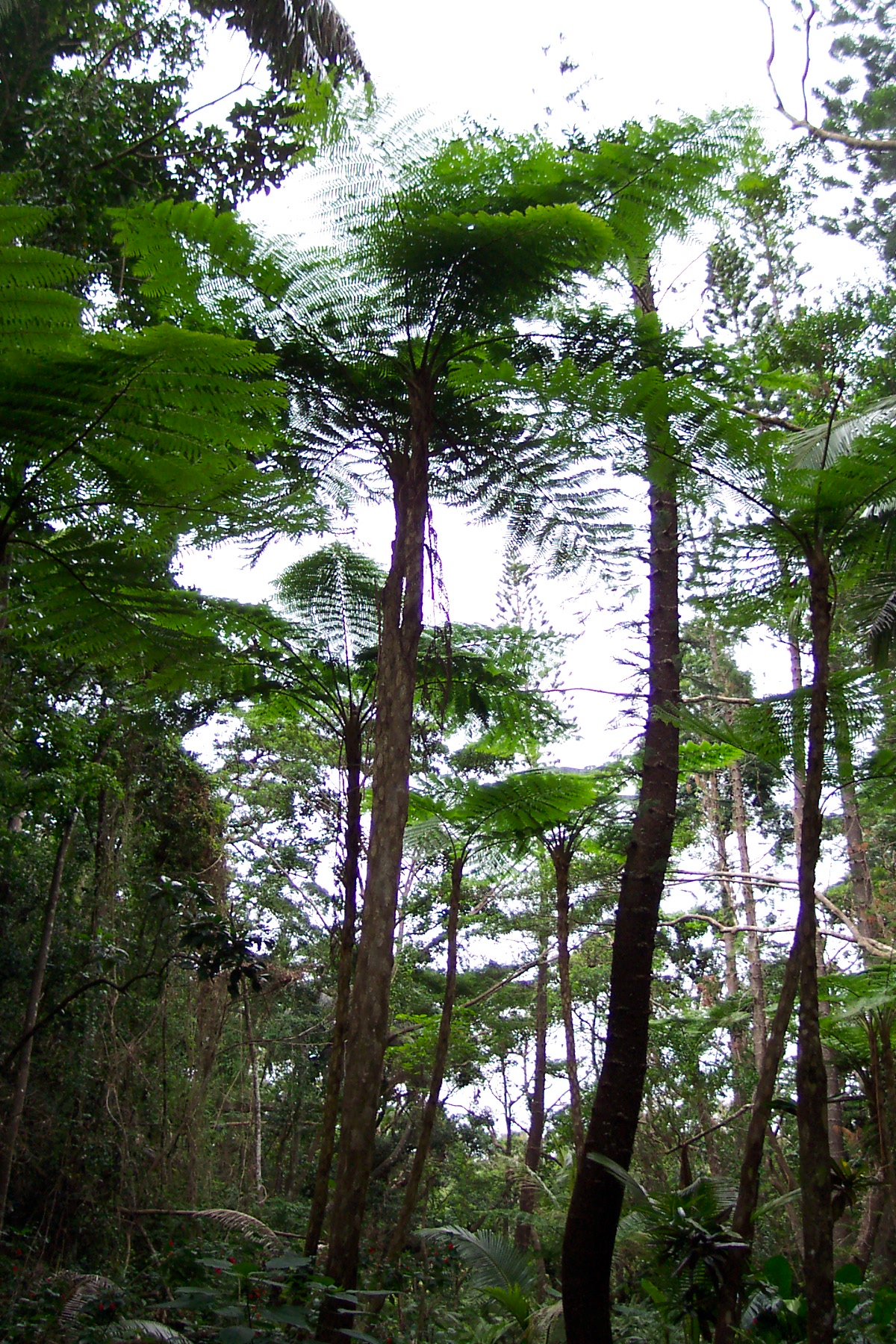 Fougère arborescente - Filicophyta - Île des Pins Nouvelle-Calédonie Photo personnelle libre de droits